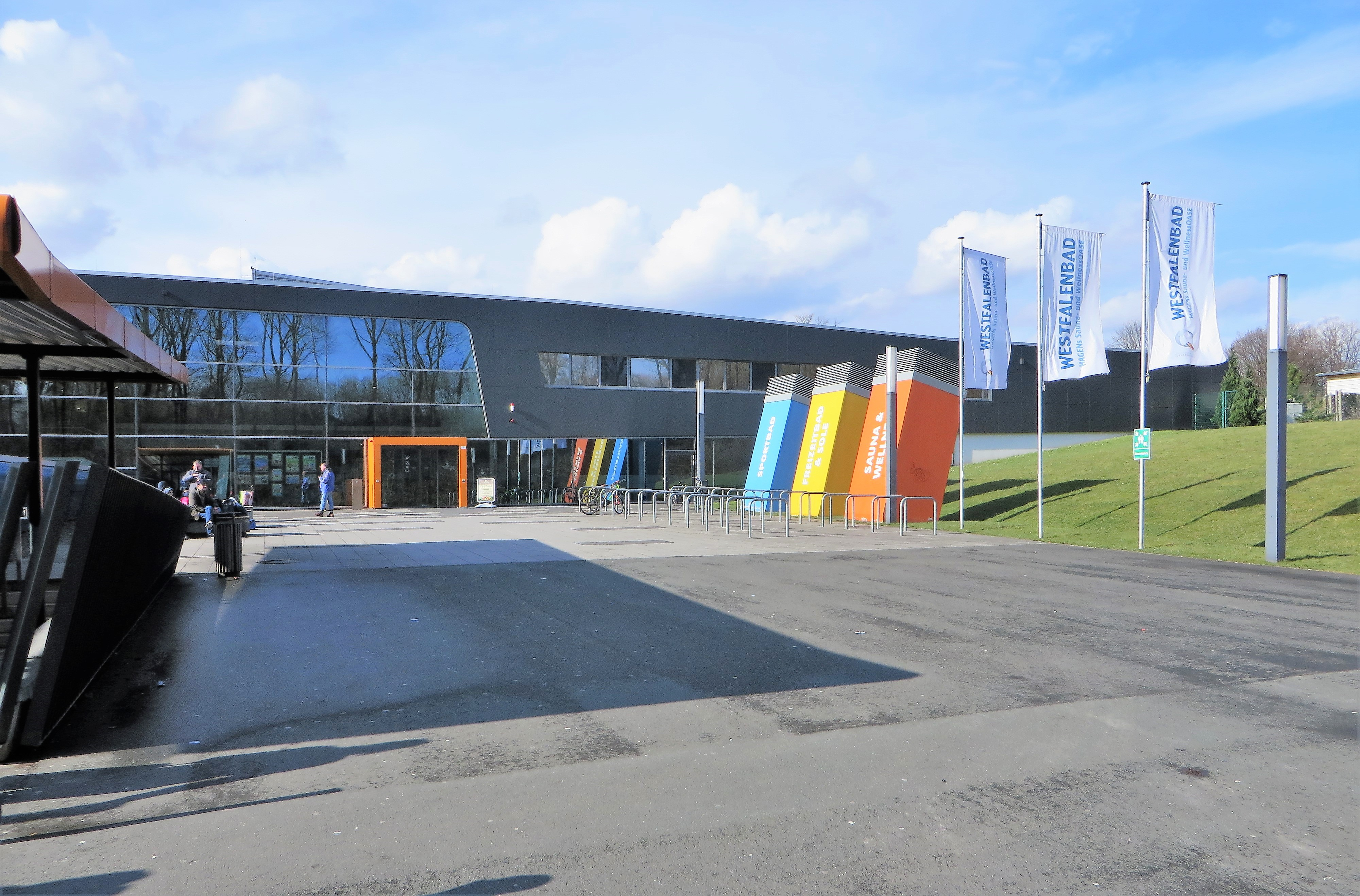 Westfalenbad in Hagen, Stadionstraße 15 vor dem Eingangsbereich.